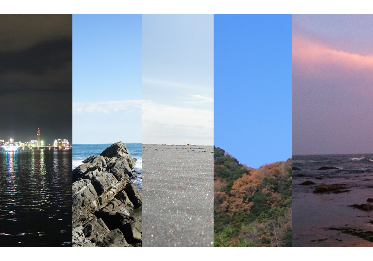 四季折々の魅力にあふれる茨城県北ジオパーク。